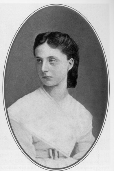 Katarzyna Dołgoruka